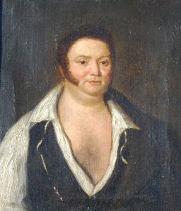 Georges Cadoudal (1771-1804)